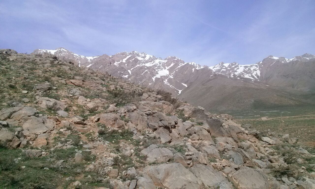 کوههای سرچشمه افوش